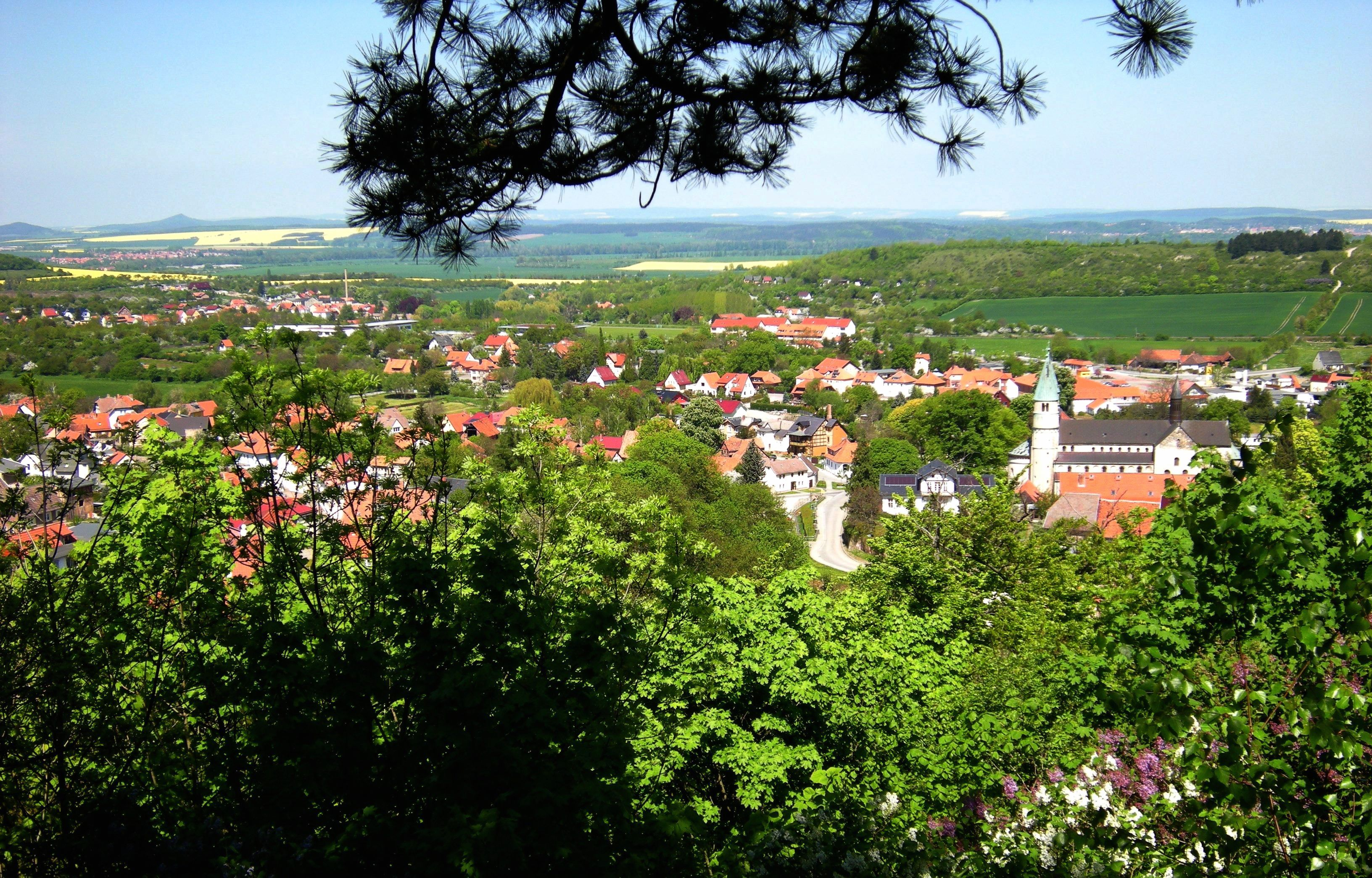 Gernrode - Ausblick von der Burg.jpg